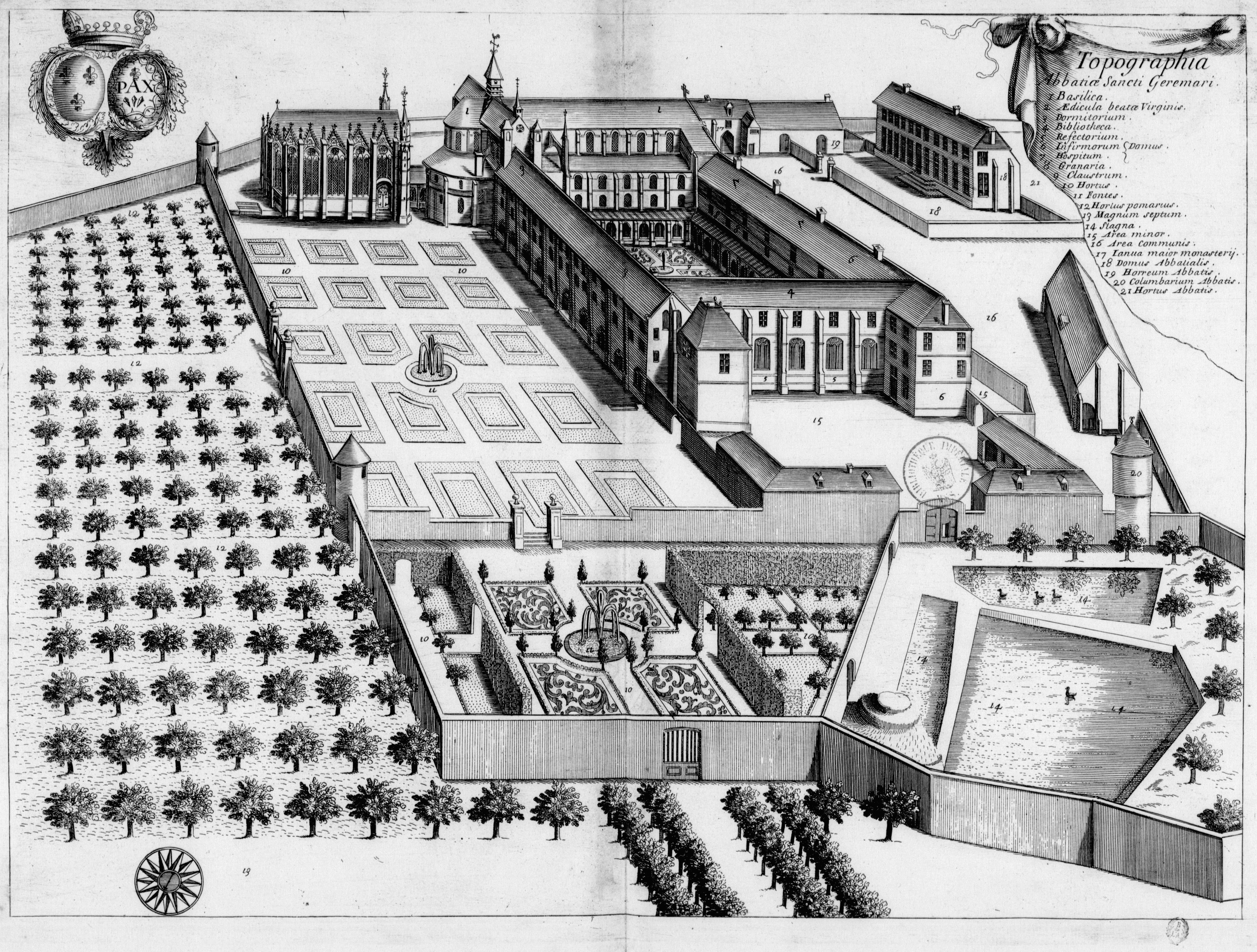 Planche gravée du 17ème siècle représentant l'abbaye Saint-Germer-de-Fly, dans le livre Monasticon Gallicanum.